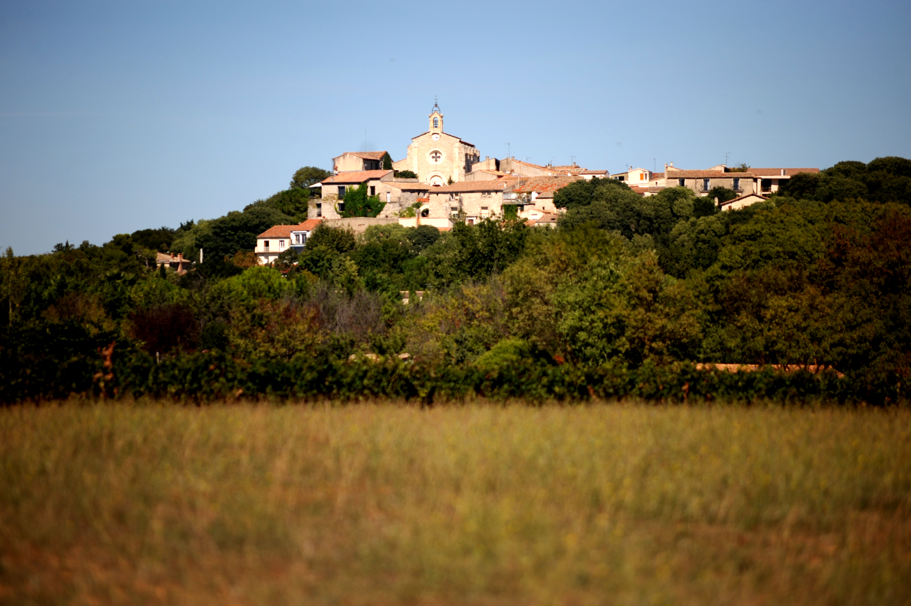 La colline de Teyran et son église